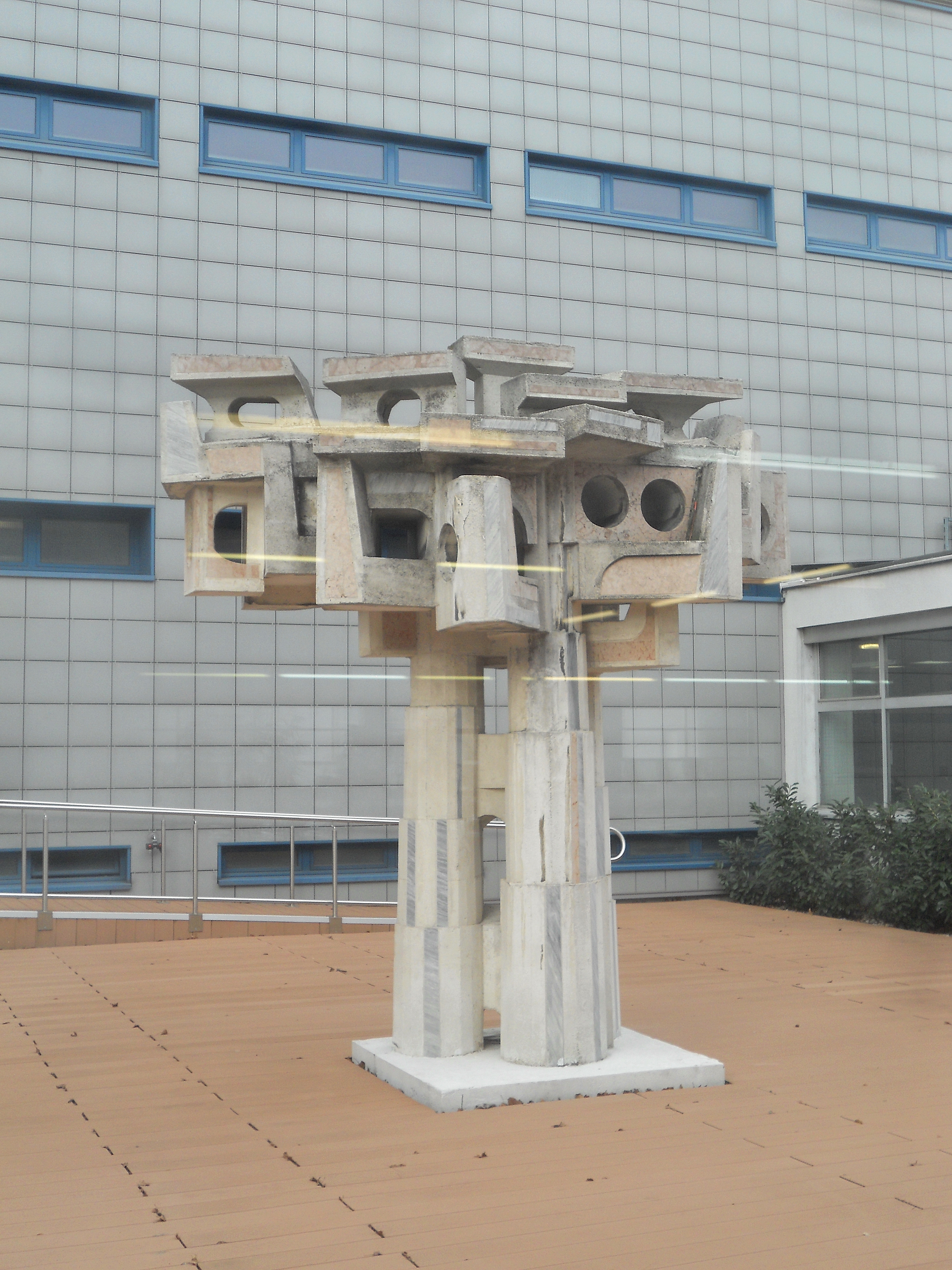 Skulptur "Lebensbaum" von Heinz Leinfellner (1967) im Lichthof des Floridsdorfer Hallenbades